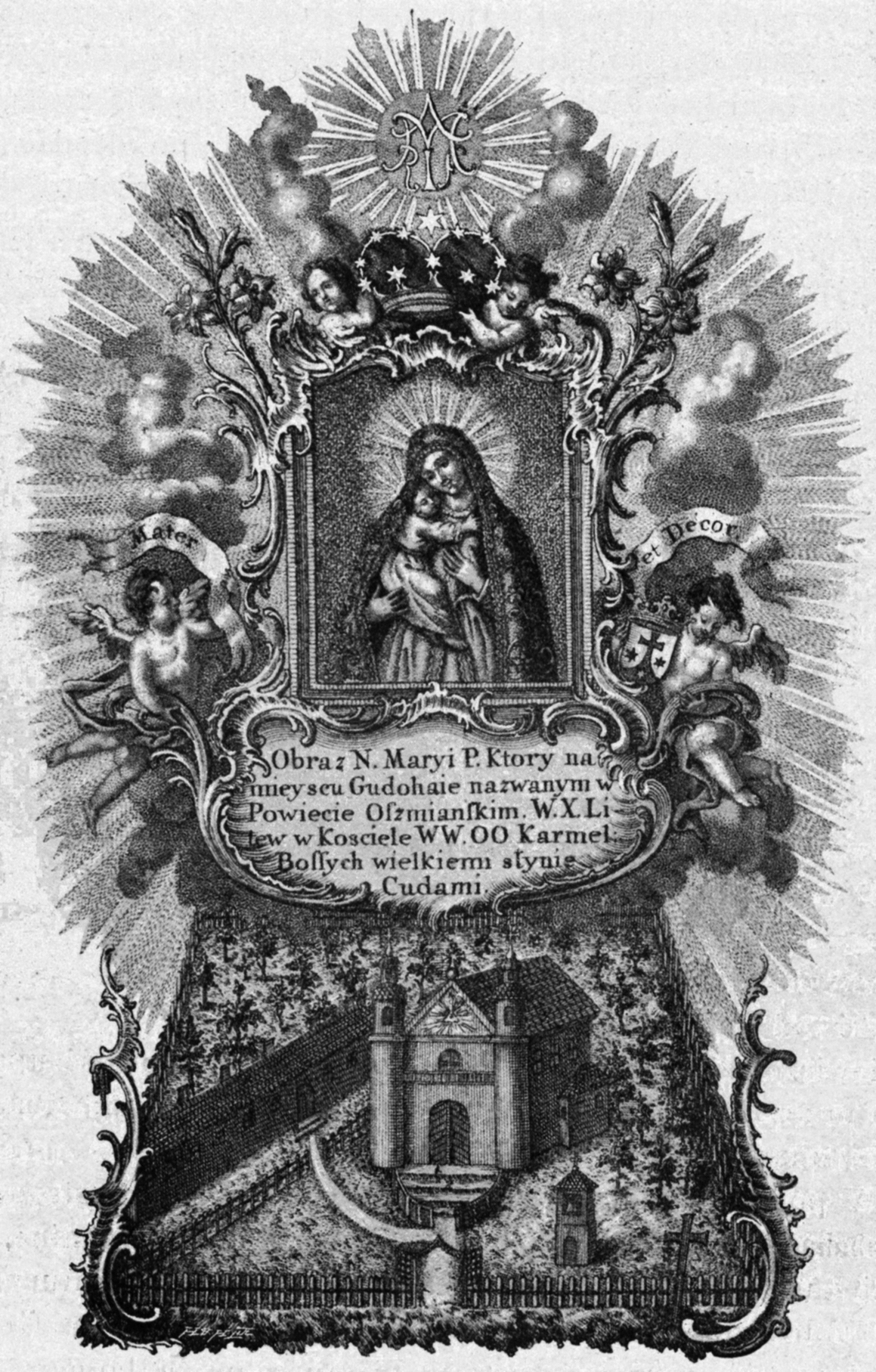 Беларуская (тарашкевіца): Гудагай (Hudahaj). Касьцёл і кляштар кармэлітаў босых. Абраз Маці Божай, медзярыт